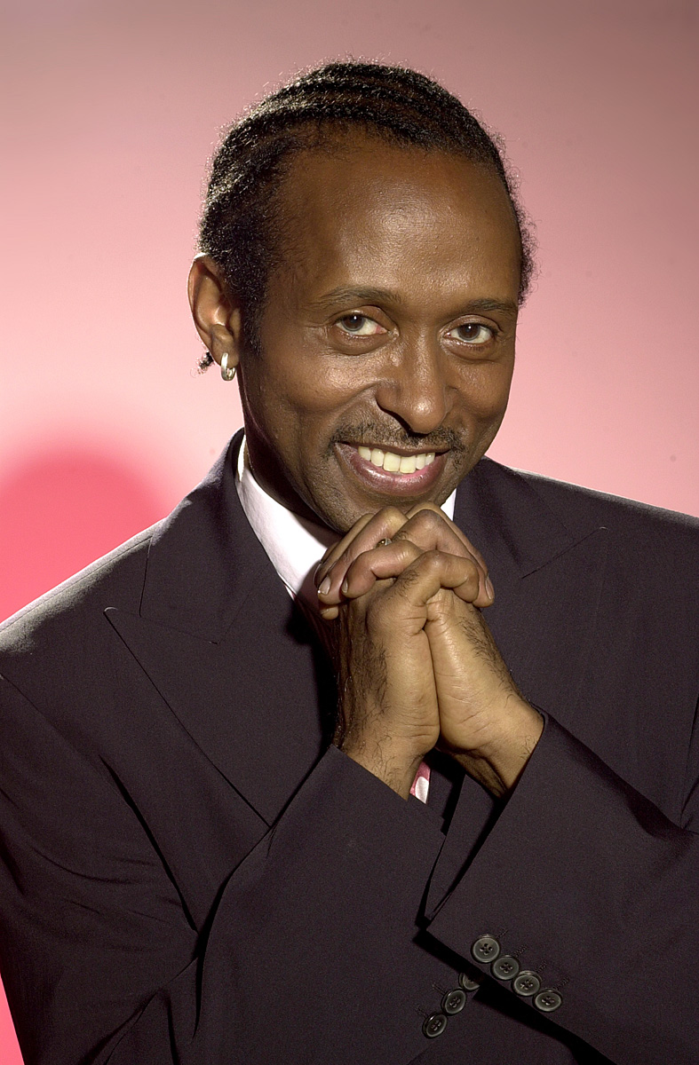 Amerikaans zanger